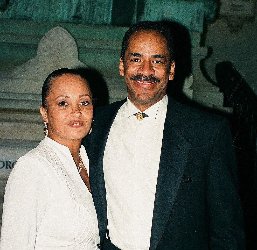 Wash D.C. Jan 20, 1997